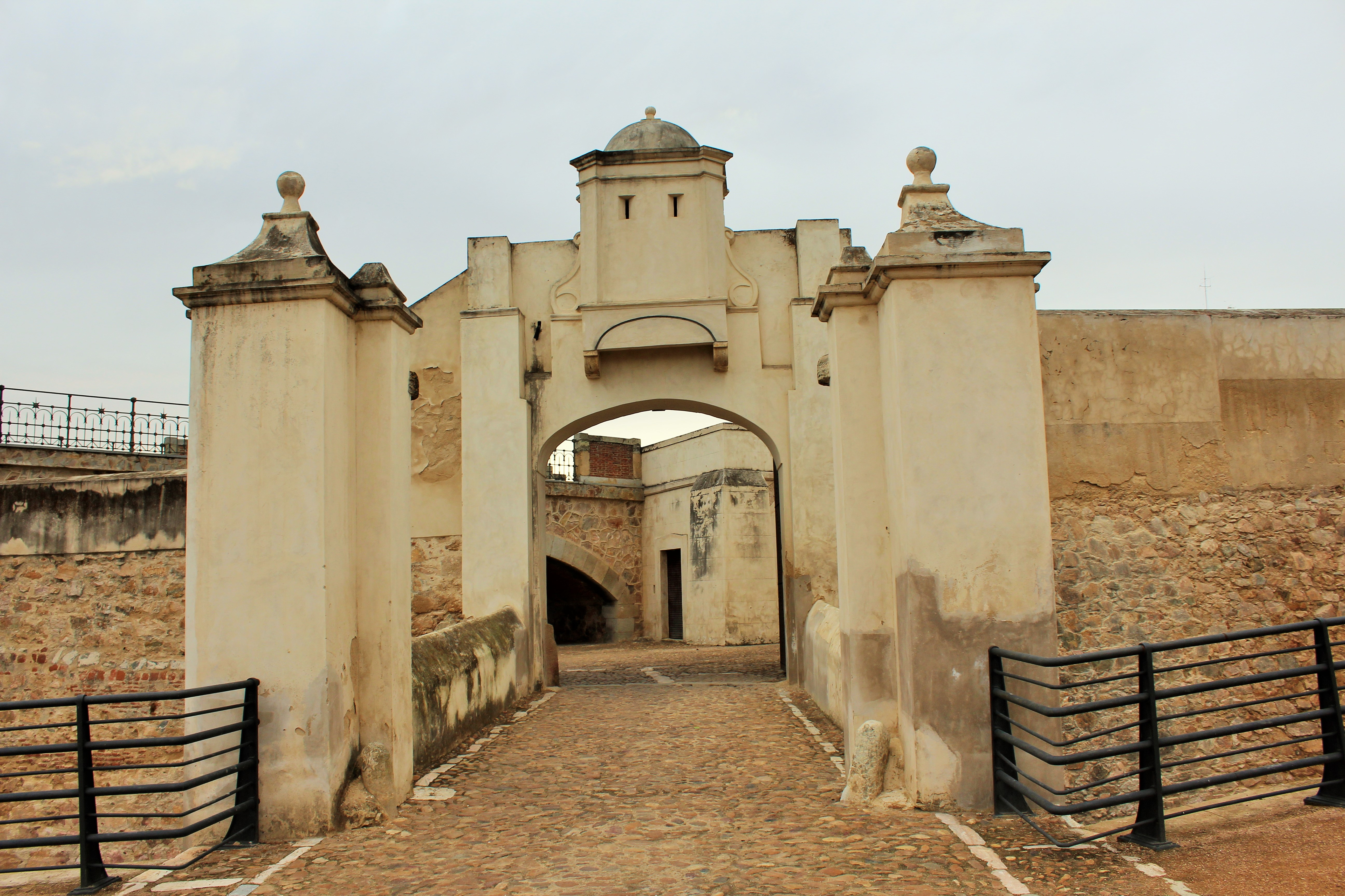 Fachada exterior de la Puerta de San Vicente